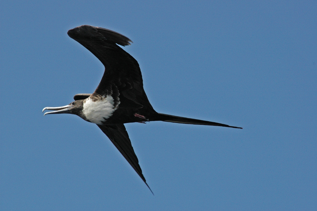 Península de Ancón, near Trinidad, Sancti Spíritus.